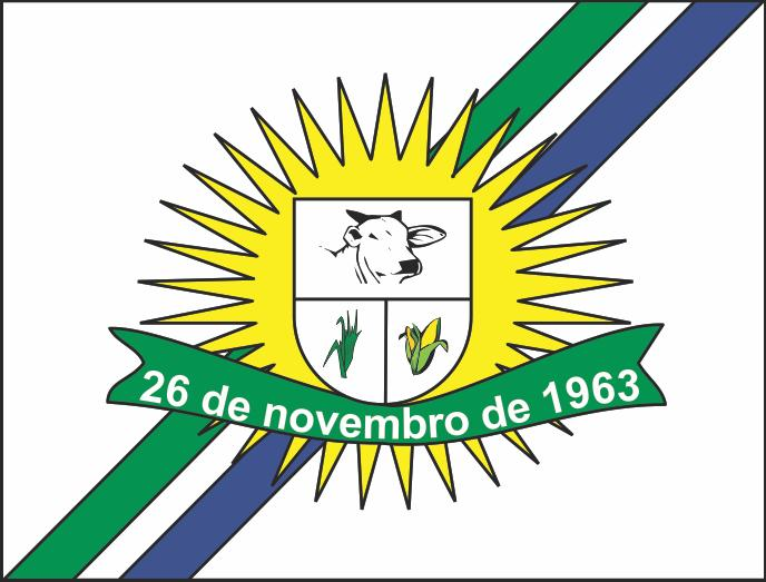 Brasão Município de São Miguel do Aleixo